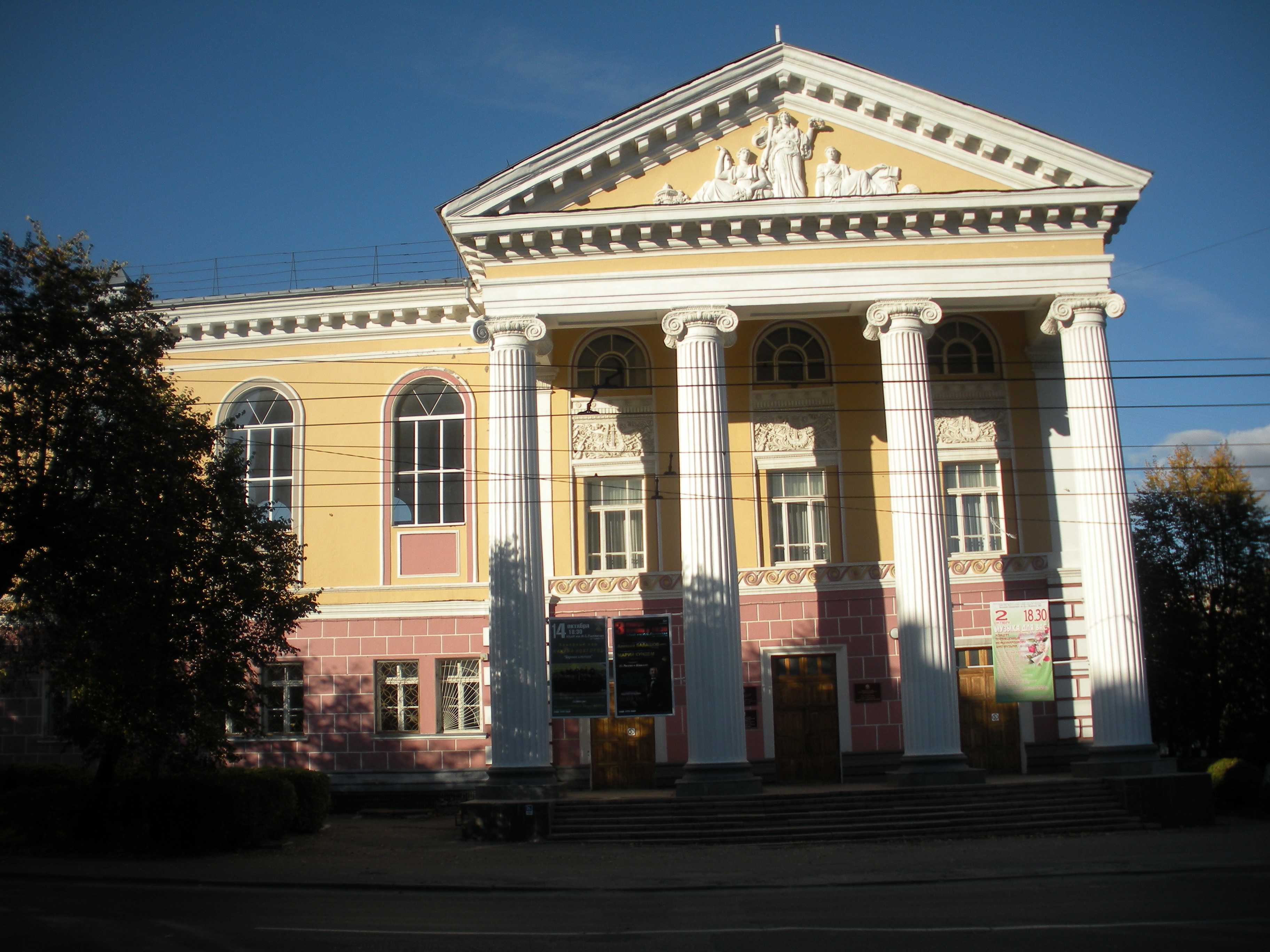 Училище музыкальное: улица Пушкина, 26, Йошкар-Ола, Марий Эл